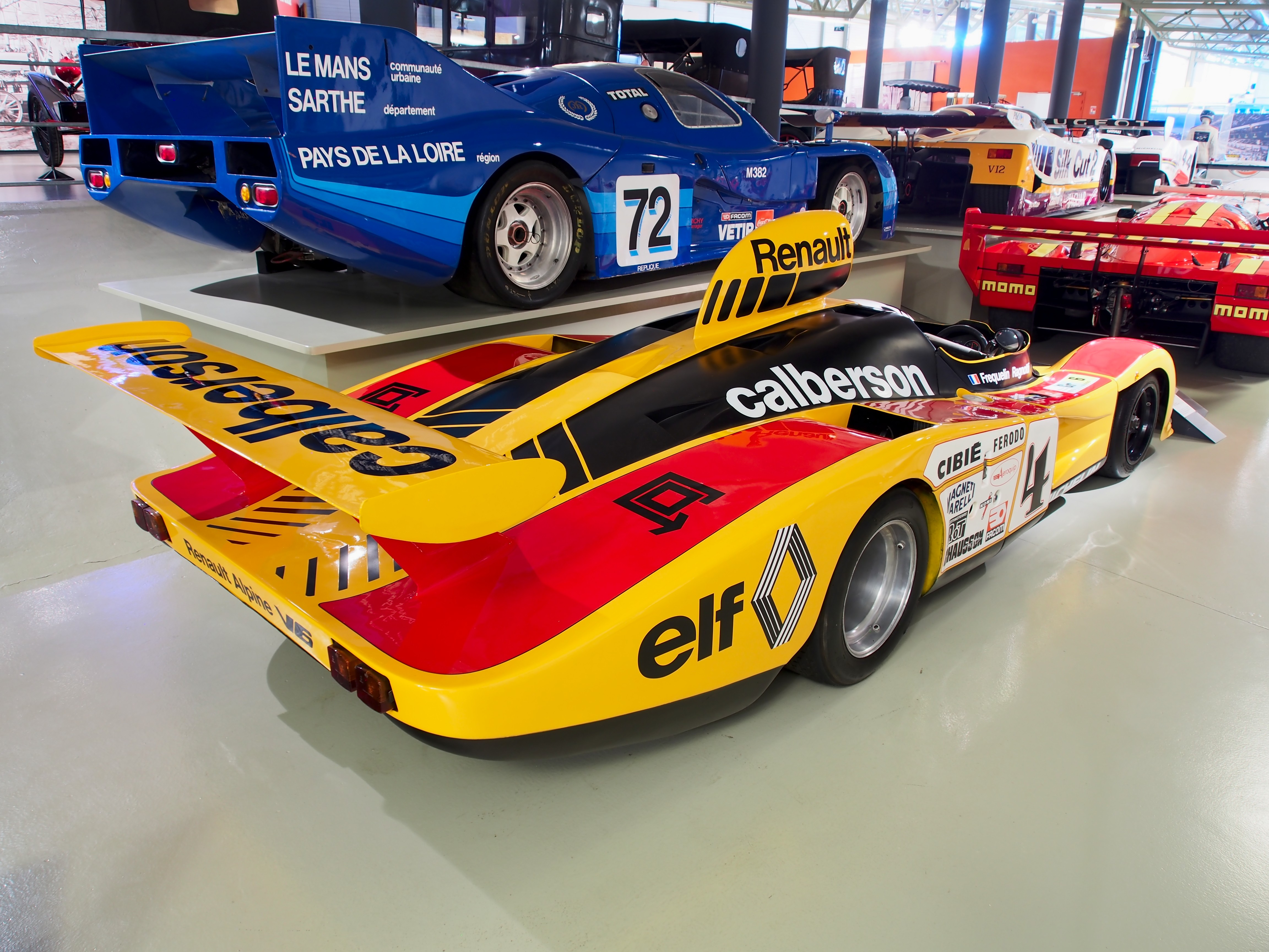 Photographed at Musée des 24 Heures du Mans, France.